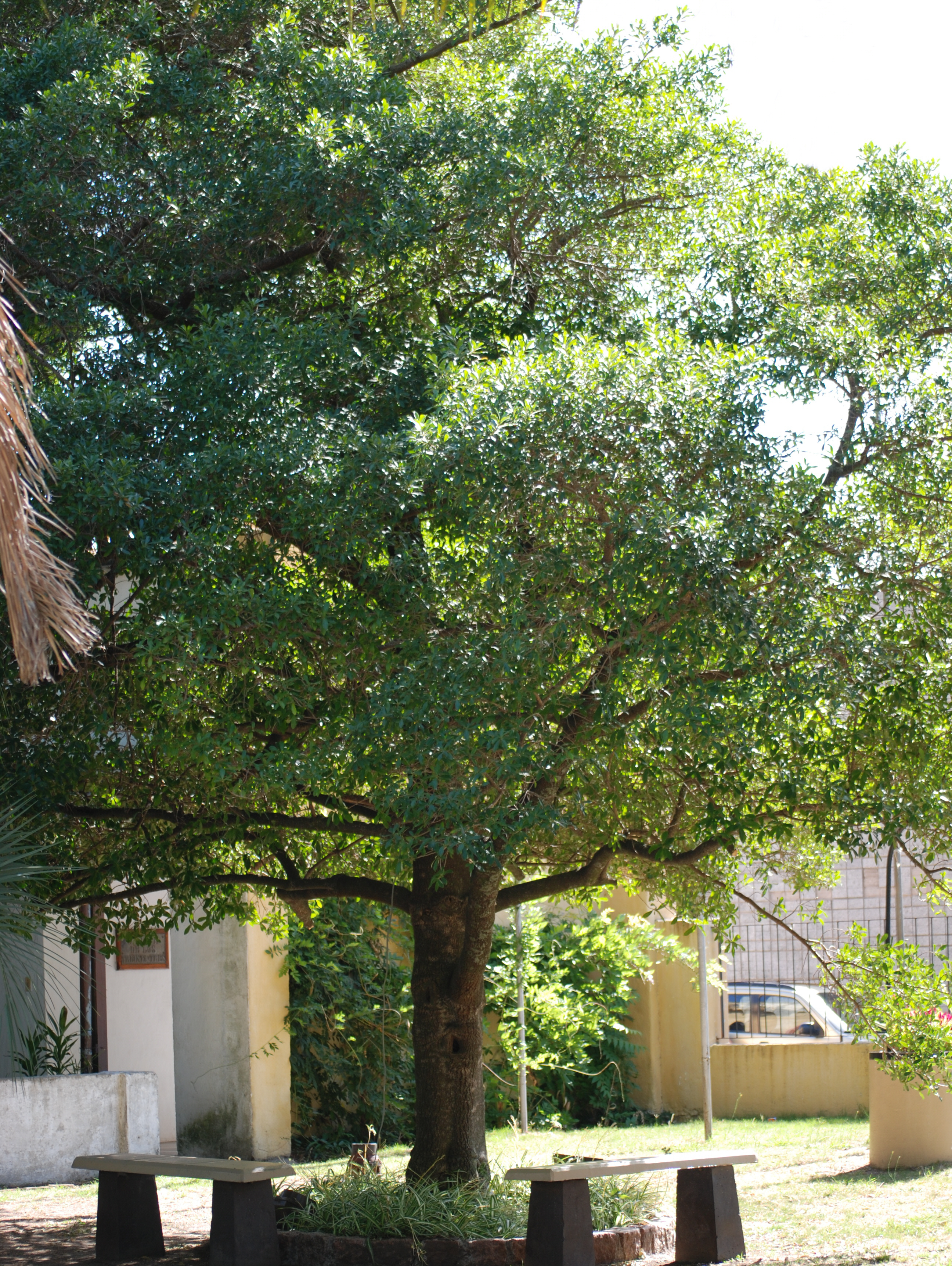 Fotografía de un árbol de Rapanea laetevirens, ubicado en el museo de Canelones (Uruguay).